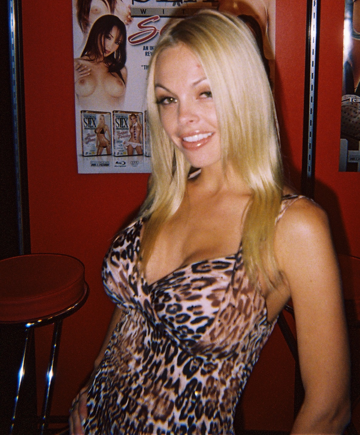 Jesse Jane auf der Venus 2007